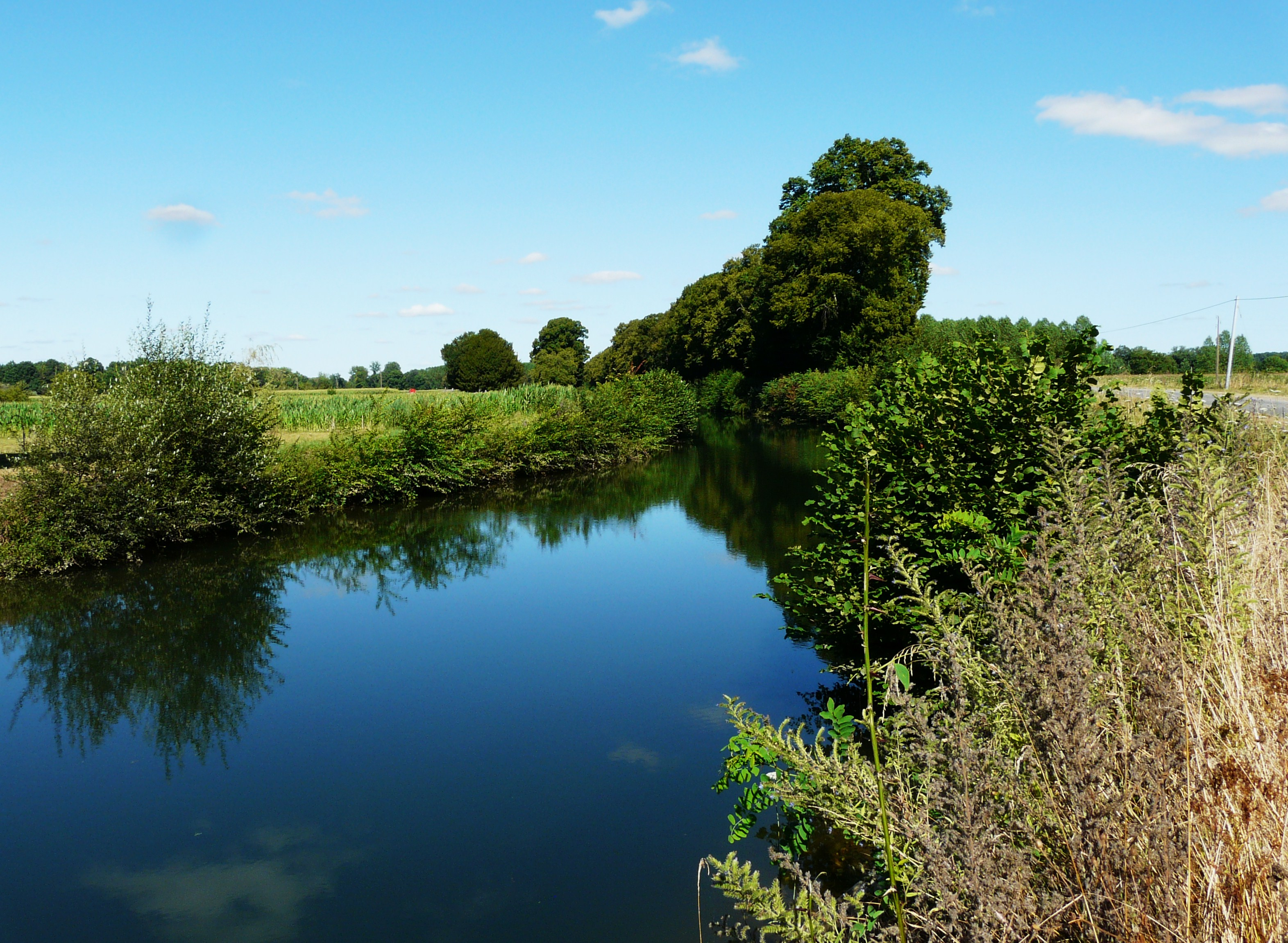 Canal d'Annesse à Annesse-et-Beaulieu, Dordogne, France